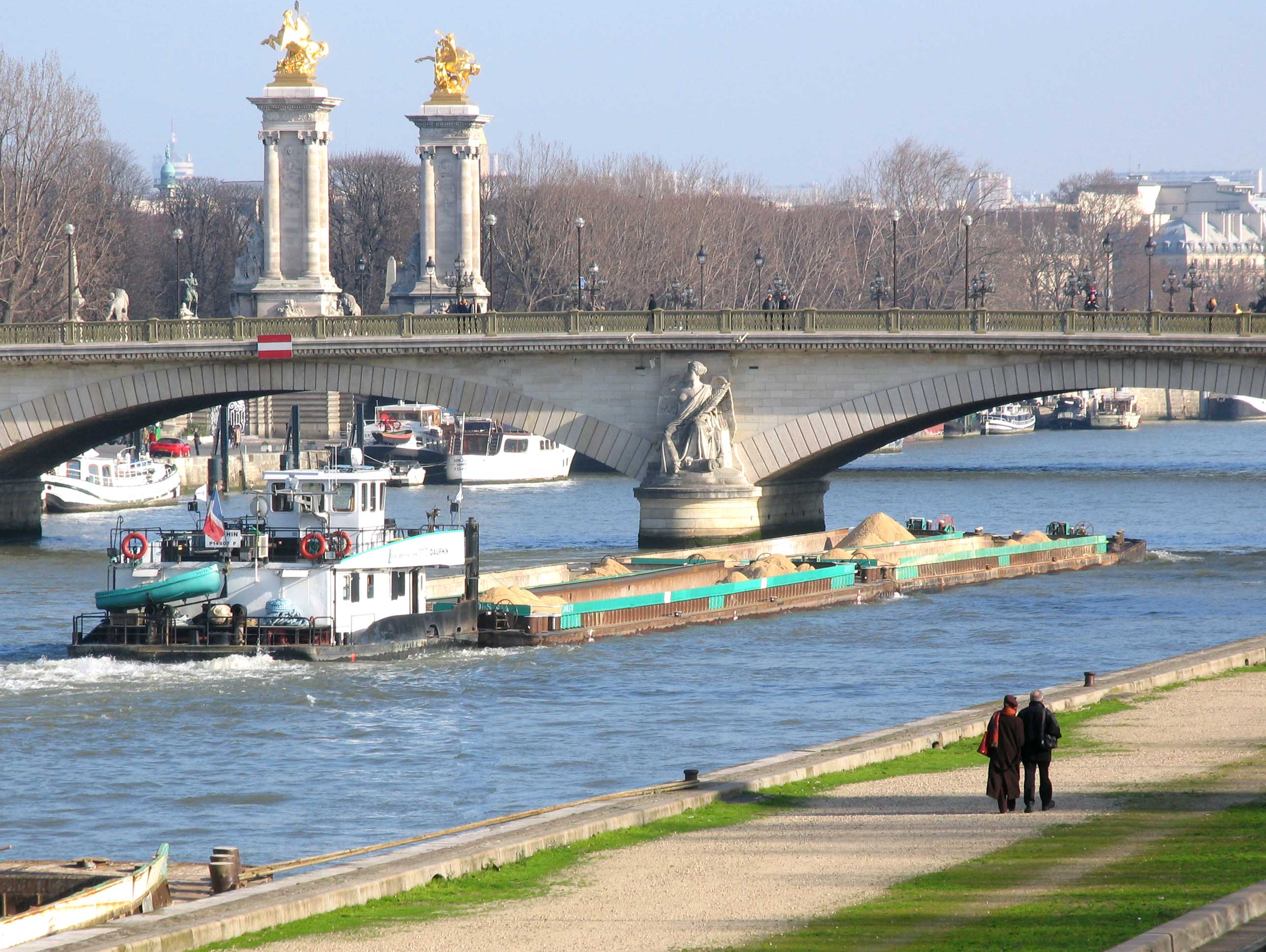 Un pousseur et son chargement de sable passe sous le pont des Invalides sur la Seine à Paris, France. En arrière plan on distingue les statues monumentales du pont Alexandre III